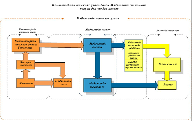 Монгол: хамаарал